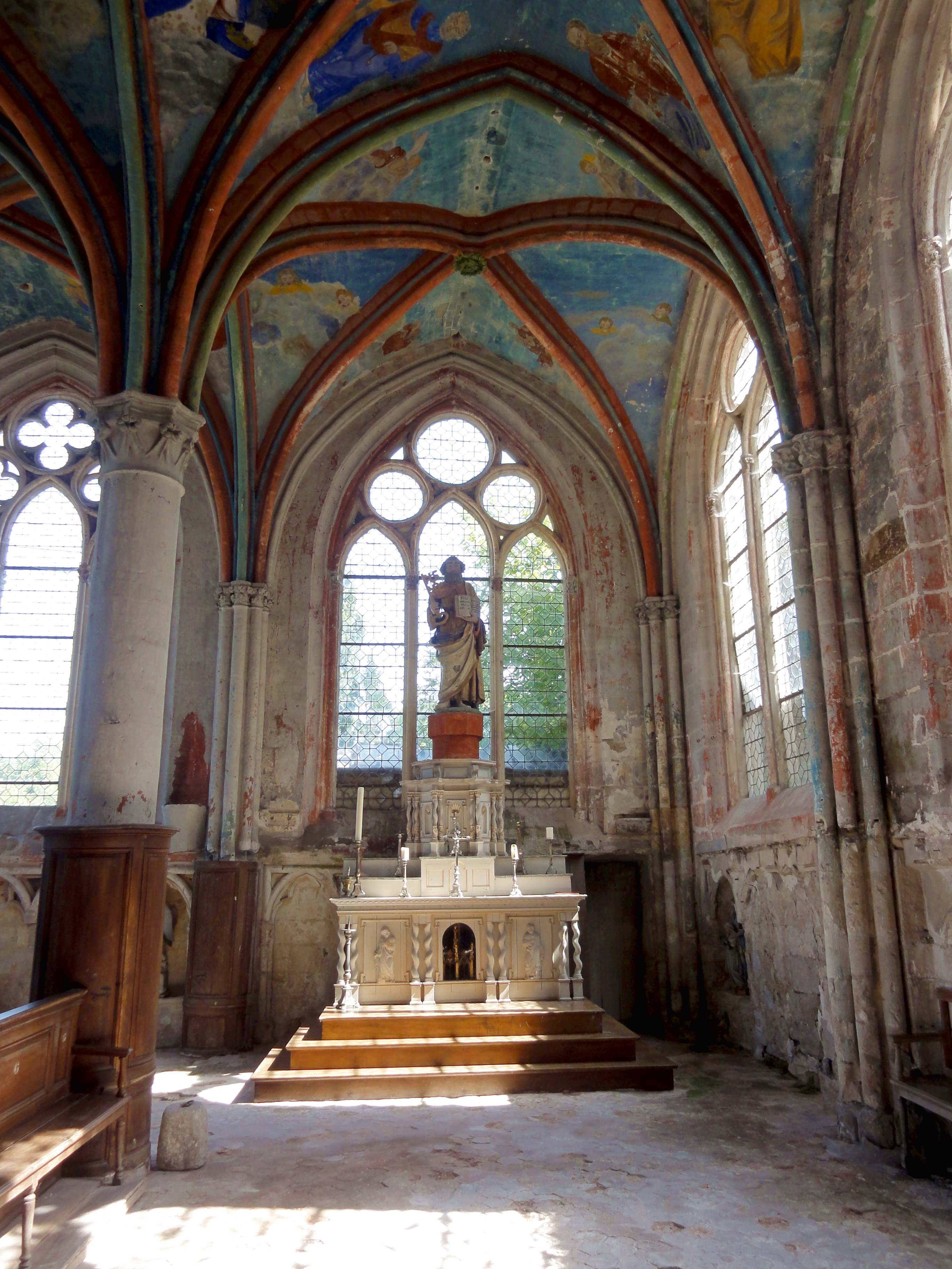 Intérieur de l'église (voir titre).